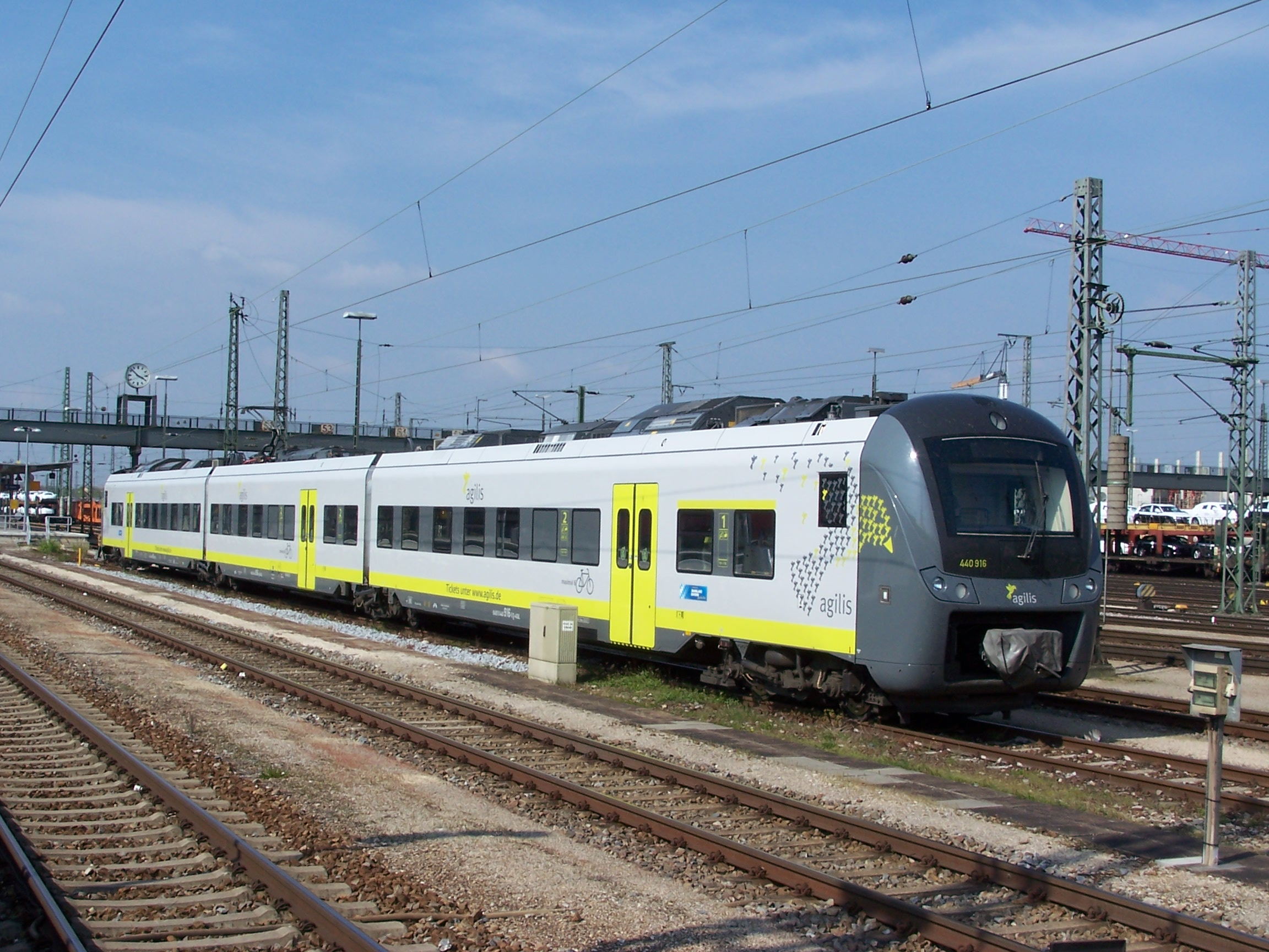 agilis 440 916 abgestellt am Ingolstädter Hbf.